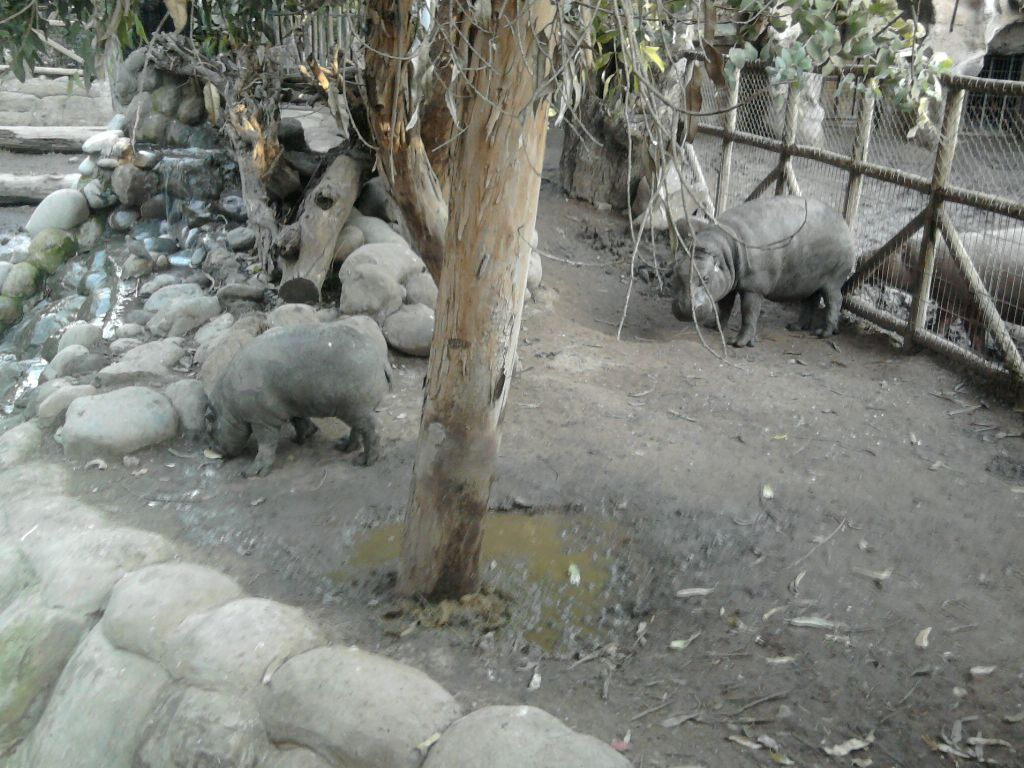 Familia de hipopotamos pigmeos de Buin Zoo